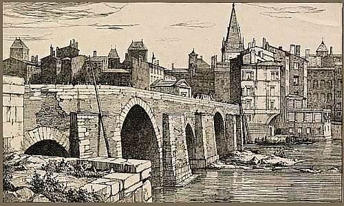 Pont de Pierre par Hippolyte Leymarie, 1843